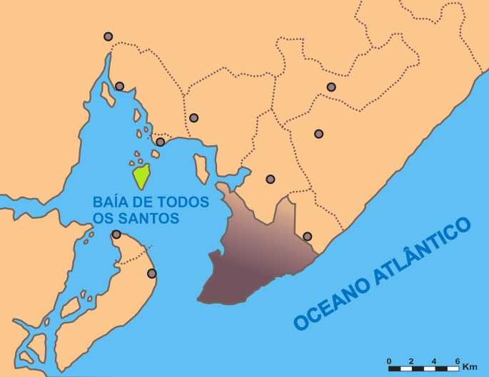 Mapa de localização da Ilha dos Frades na Baía de Todos os Santos (Bahia, Brazil)